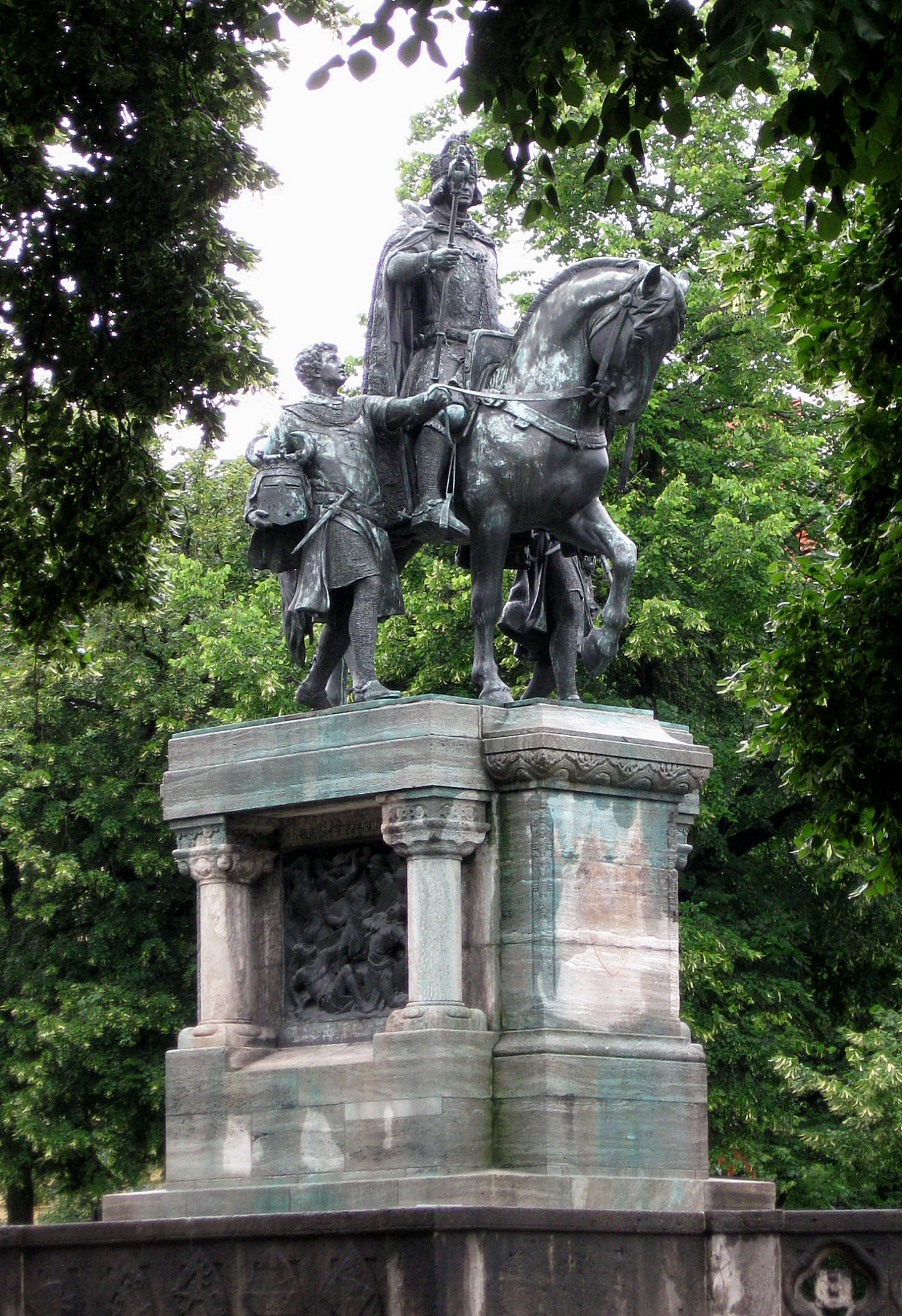 Bronzedenkmal für Ludwig der Bayer (1282–1347, Herzog von Bayern 1294–1347, seit 1314 römischer König, seit 1328 römischer Kaiser), am Kaiser-Ludwig-Platz, 1905 entworfen und gegossen von Ferdinand von Miller d. J.